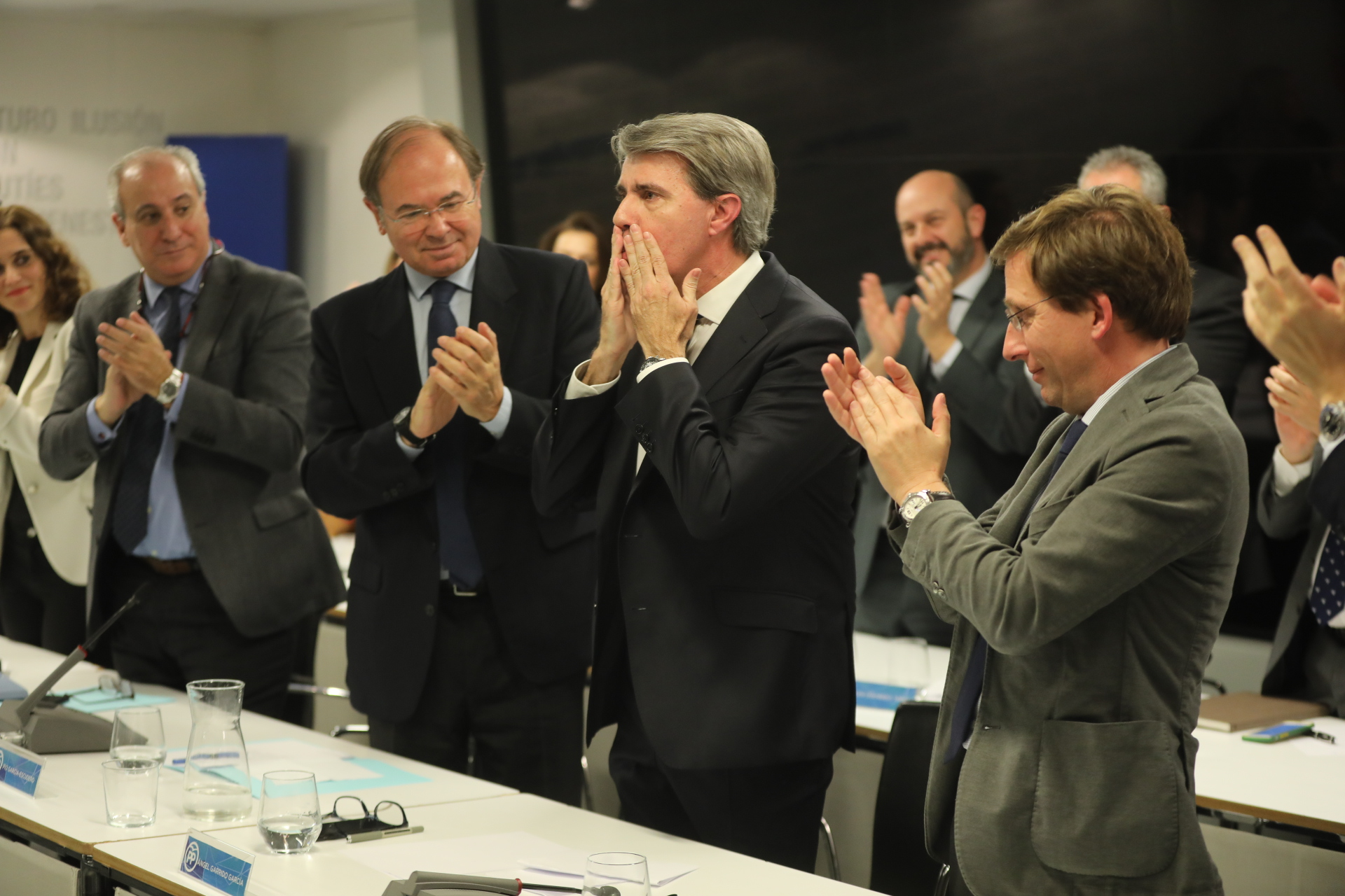 Junta Directiva Autonómica PP Madrid